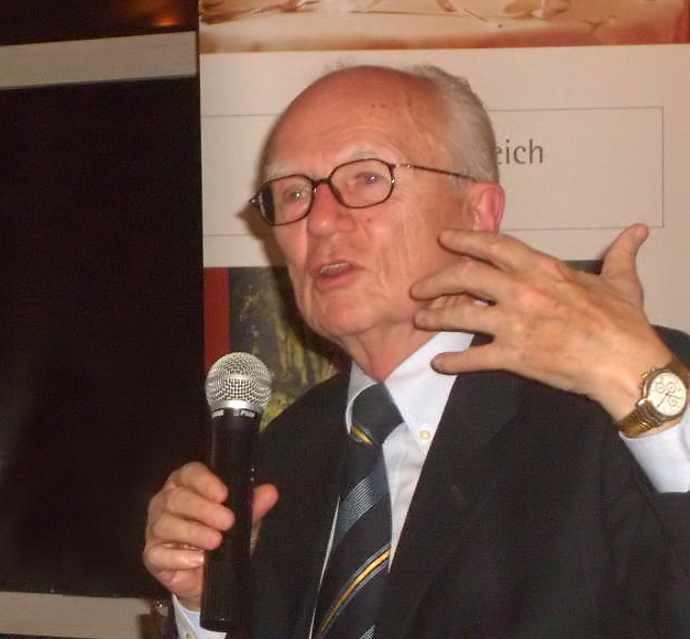 Peter Brinkmann & Friedrich Nowottny